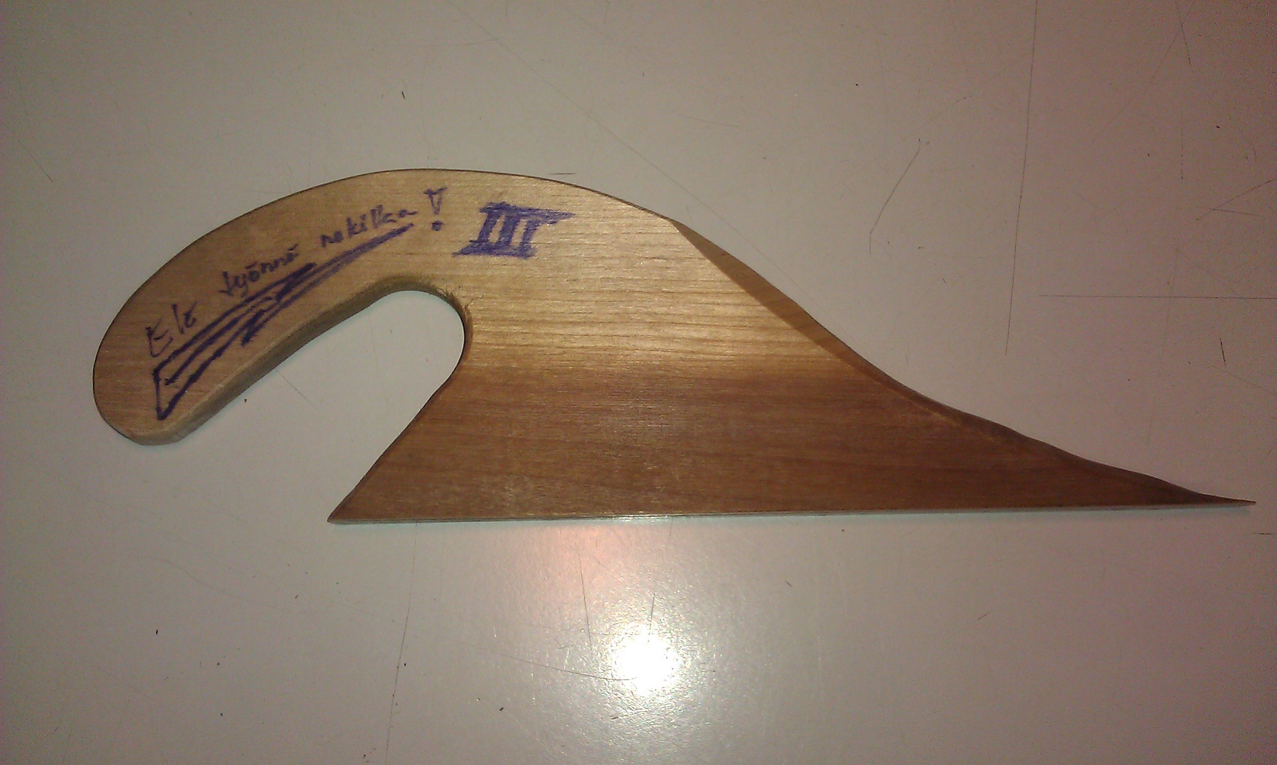 paperiteollisuudessa käytetty työkalu